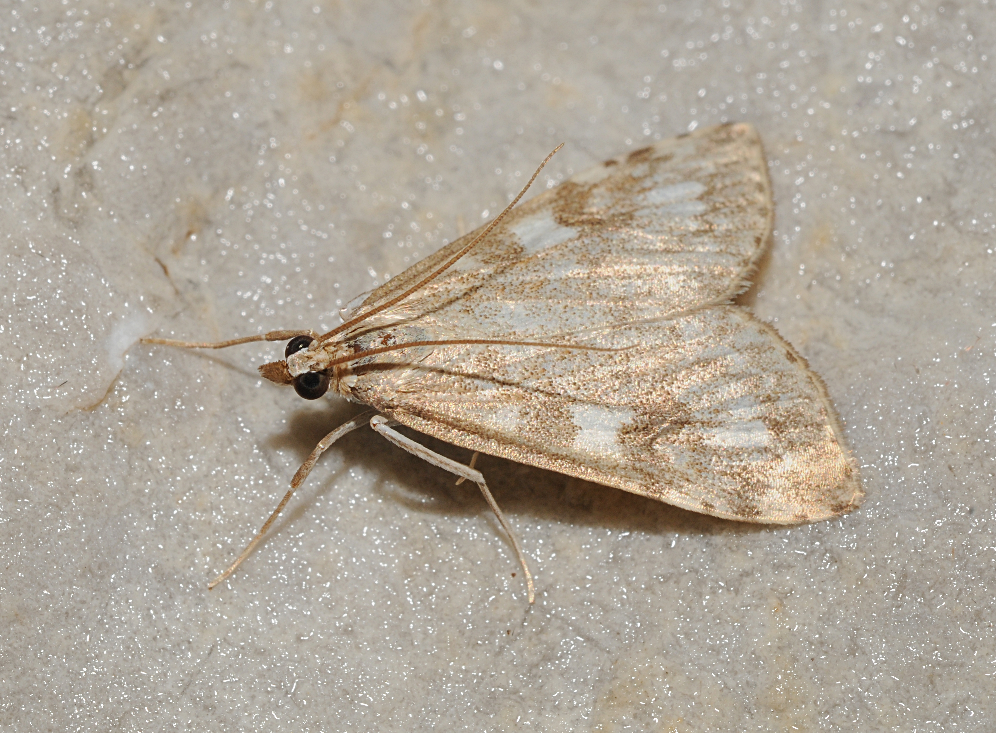 Udea olivalis Location: Großer Buchstein, Gesäuse National Park, Styria, Austria 8 EX DG APO IF Makro f/11 Film / Speed: ISO 200 Comment: identification: Heinz Habeler